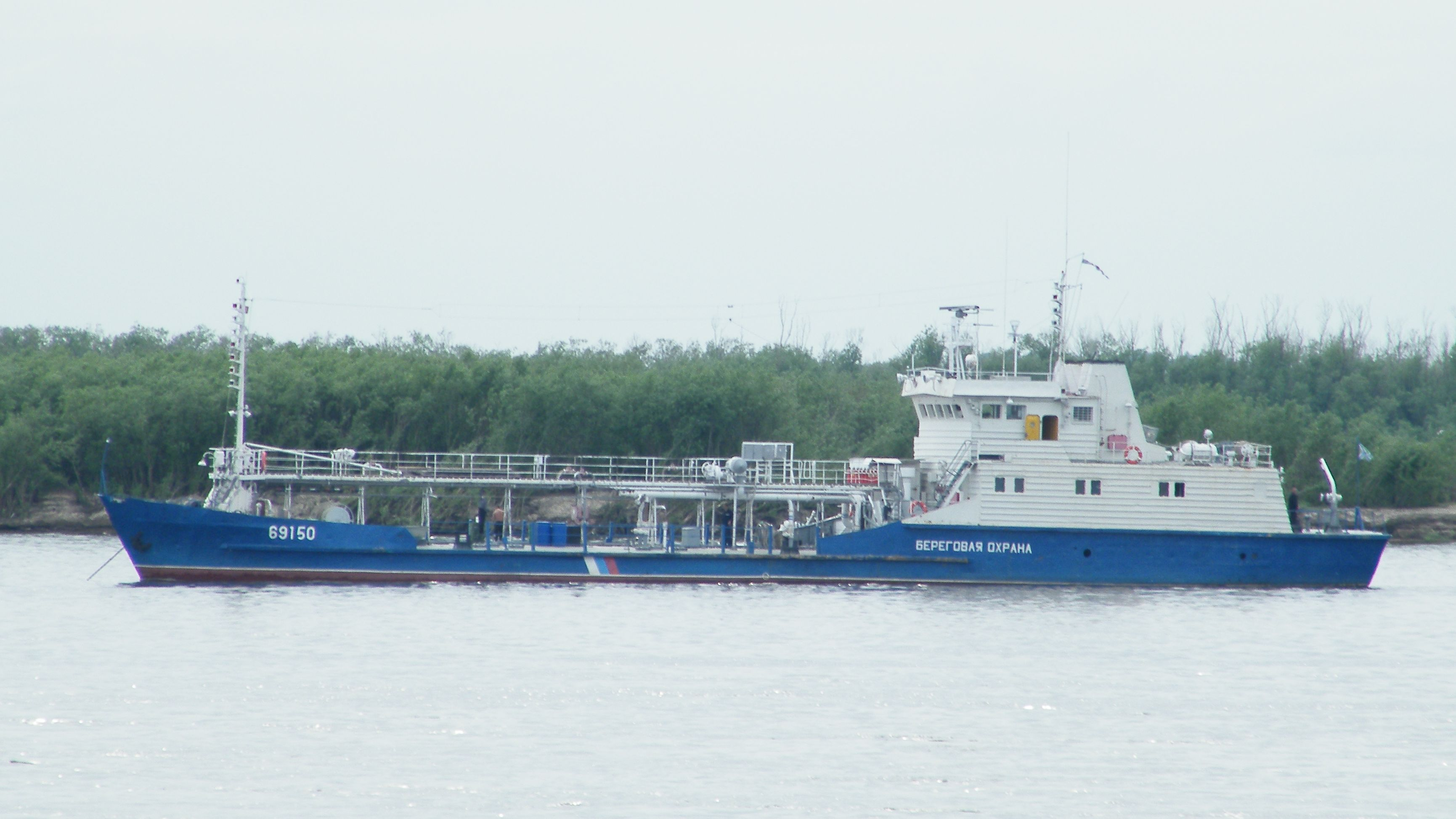 Танкер Амурской флотилии